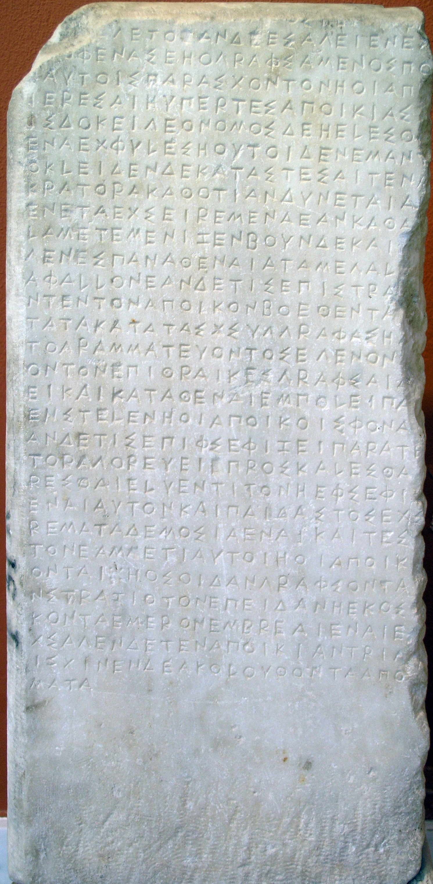 Dekret z Brea z roku 445 před Kristem. Mimo jiné je v něm zapsáno: "jeho synové a jeho majetek by měl být zabaven a připadnout z něj desátek bohyni (Athéně)".